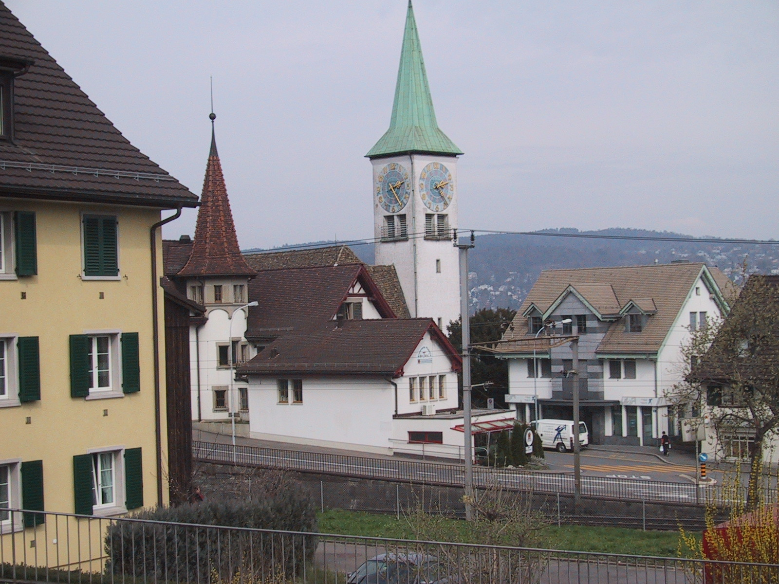 Aufnahme der Dorfkirche Rüschlikon bei Zürich